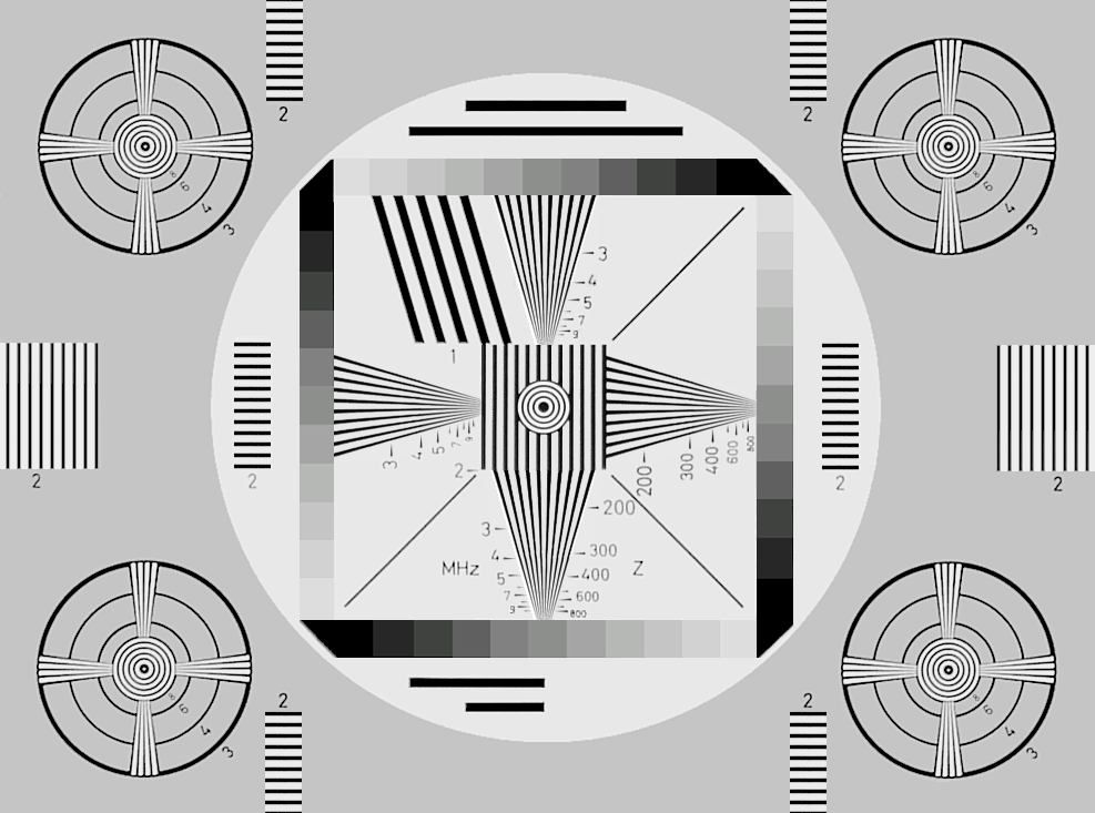 Skizze des Universal-Testbildes der ARD für das Schwarzweiß-Fernsehen der 1950er bis 1970er Jahre